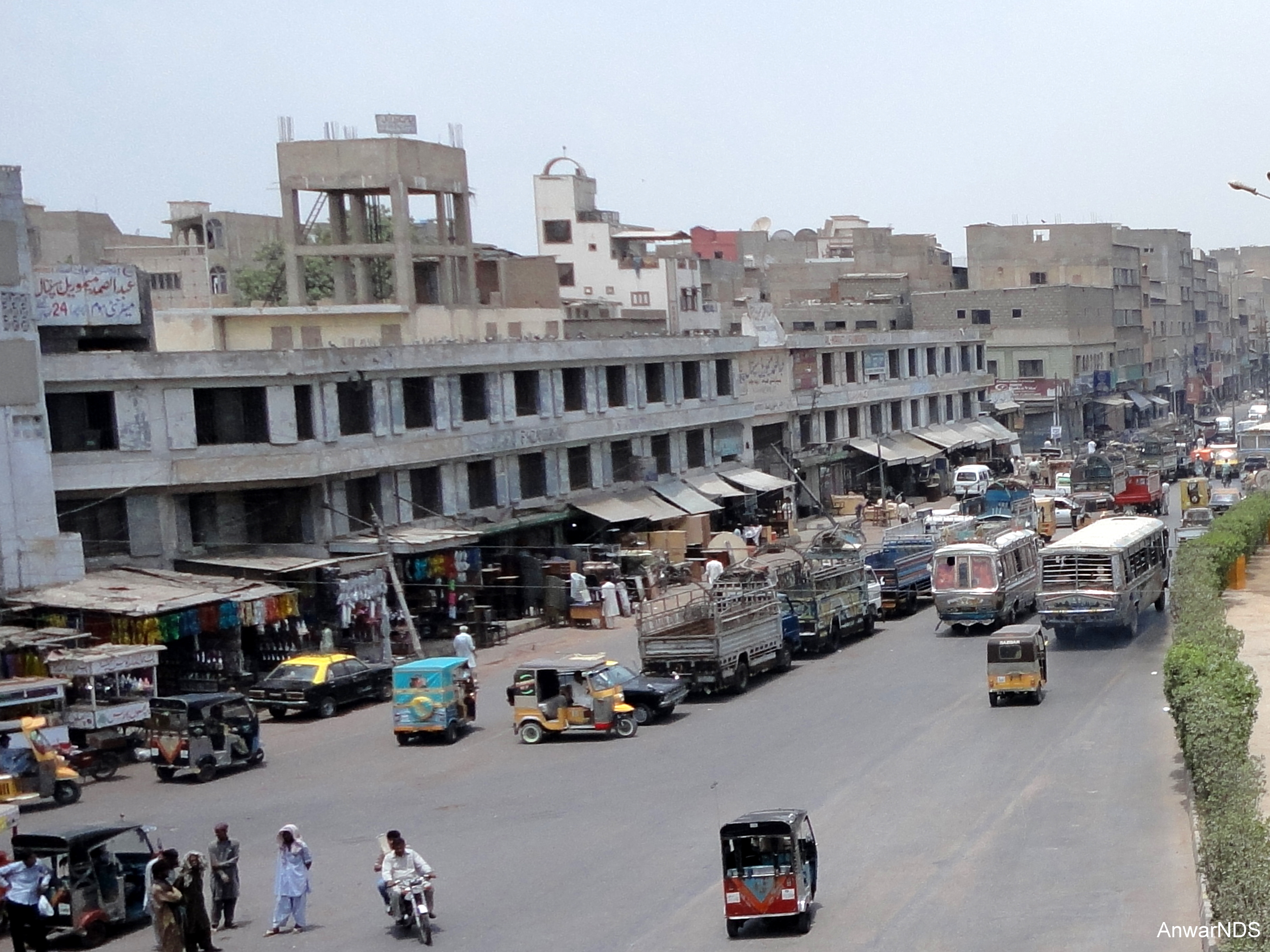 Karachi, Liaquatabad # 10